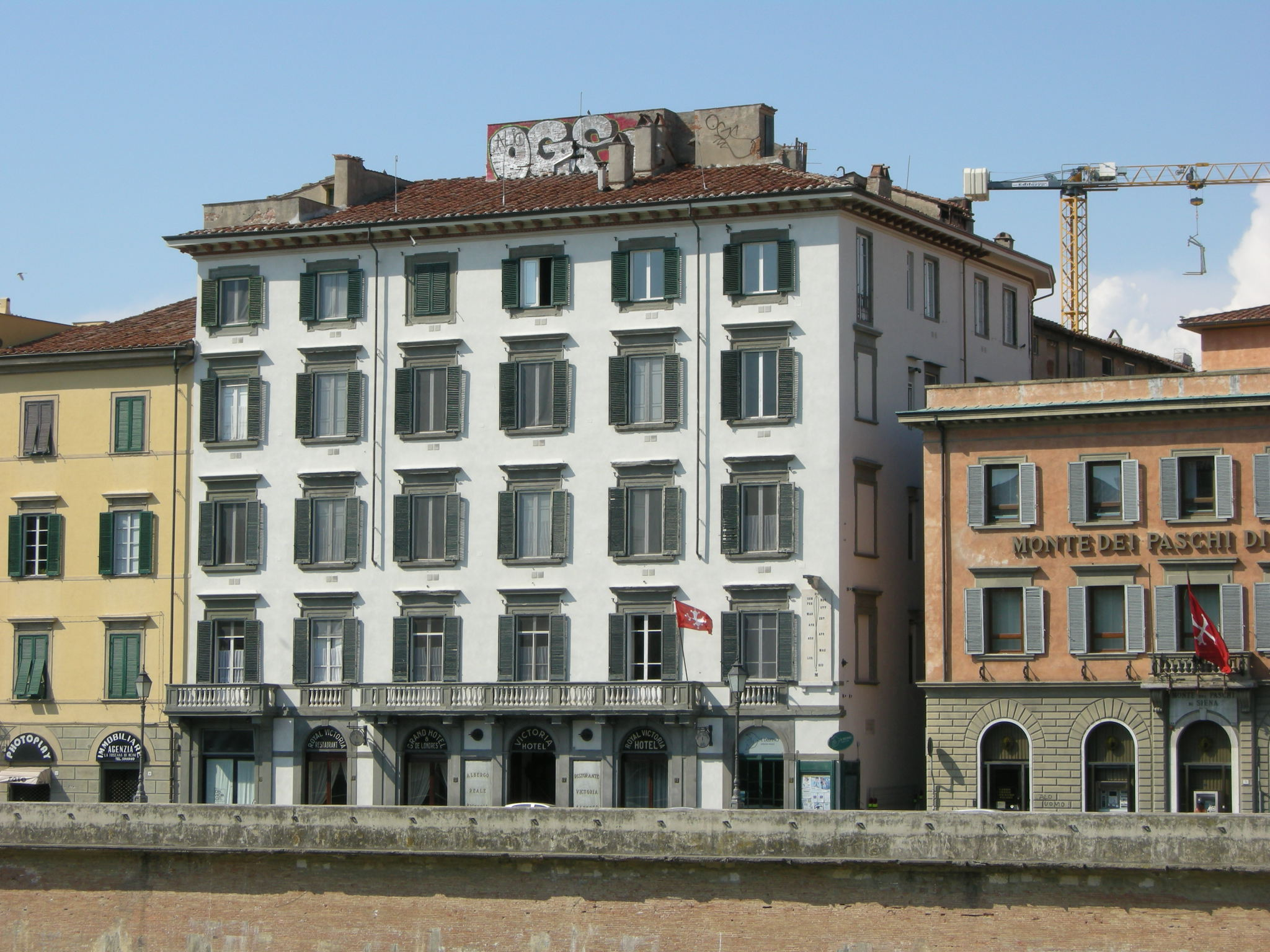 Hotel royal victoria pisa